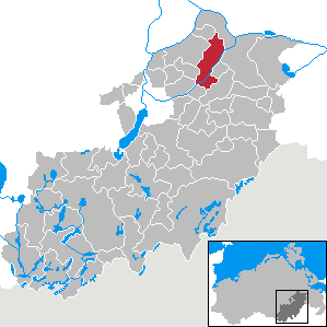 Datzetal in Mecklenburg-Vorpommern, Landkreis Mecklenburg-Strelitz